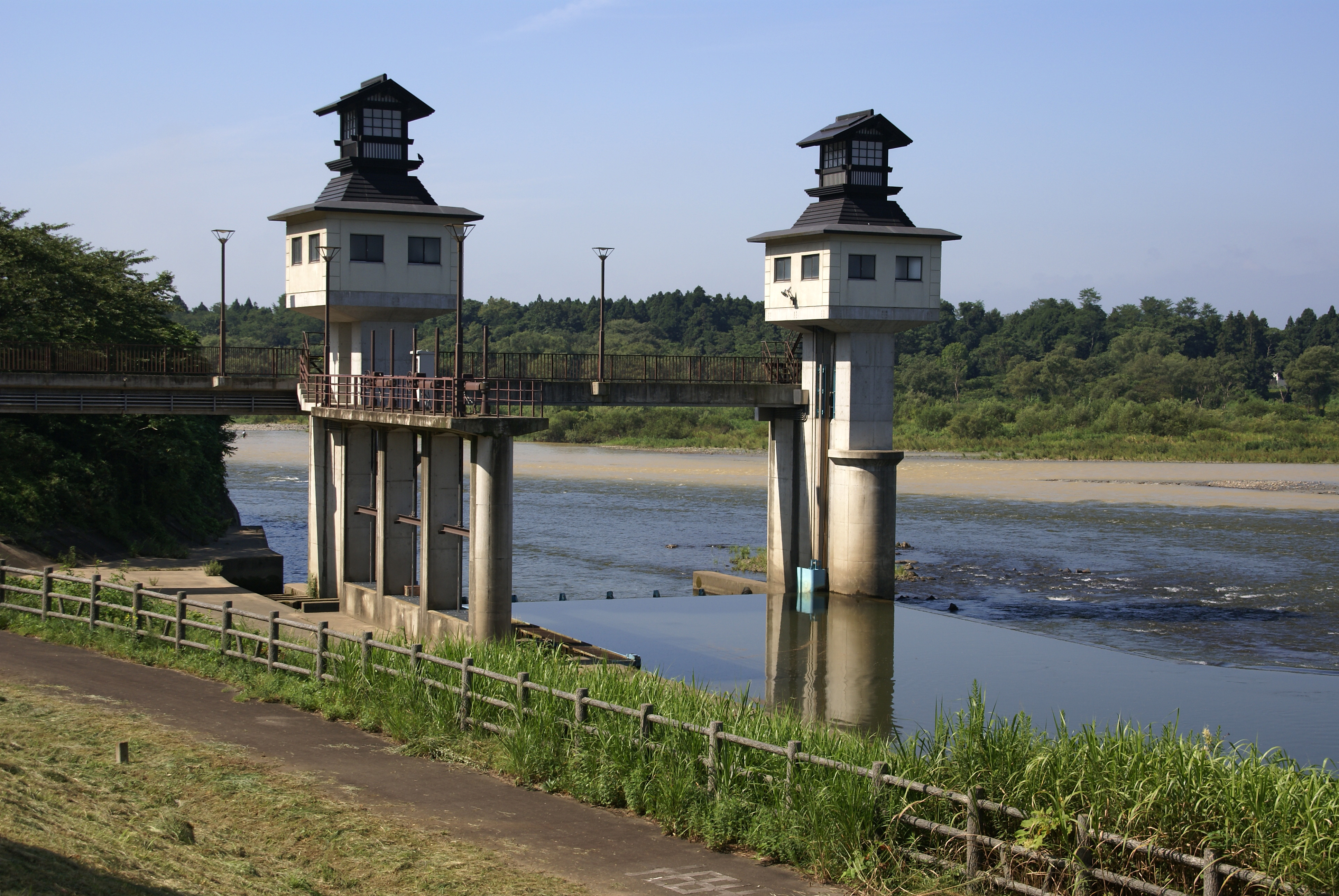 Kitakami River at Kitakami, Iwate prefecture, Japan